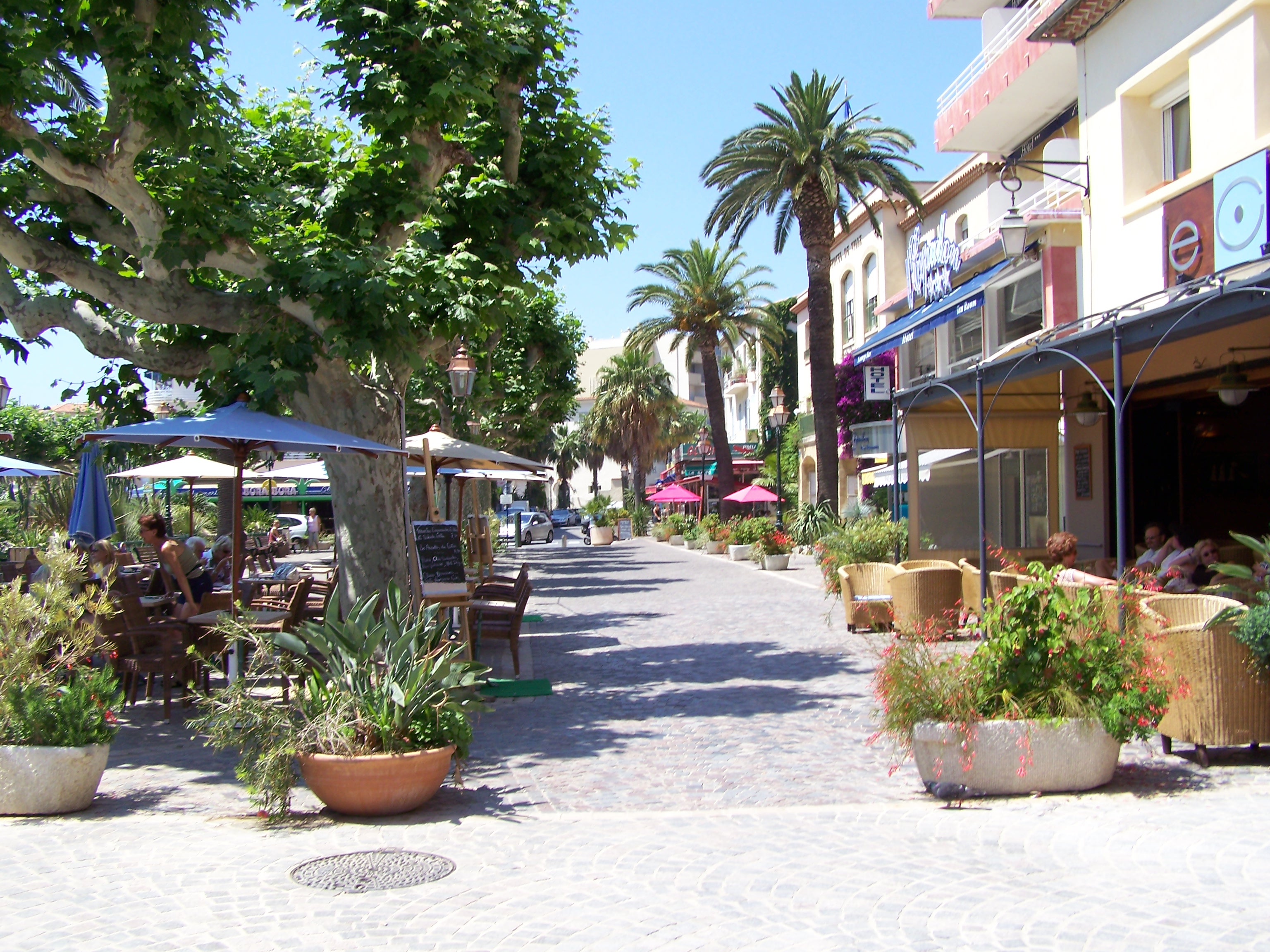 Le Lavandou - 08.06.2007